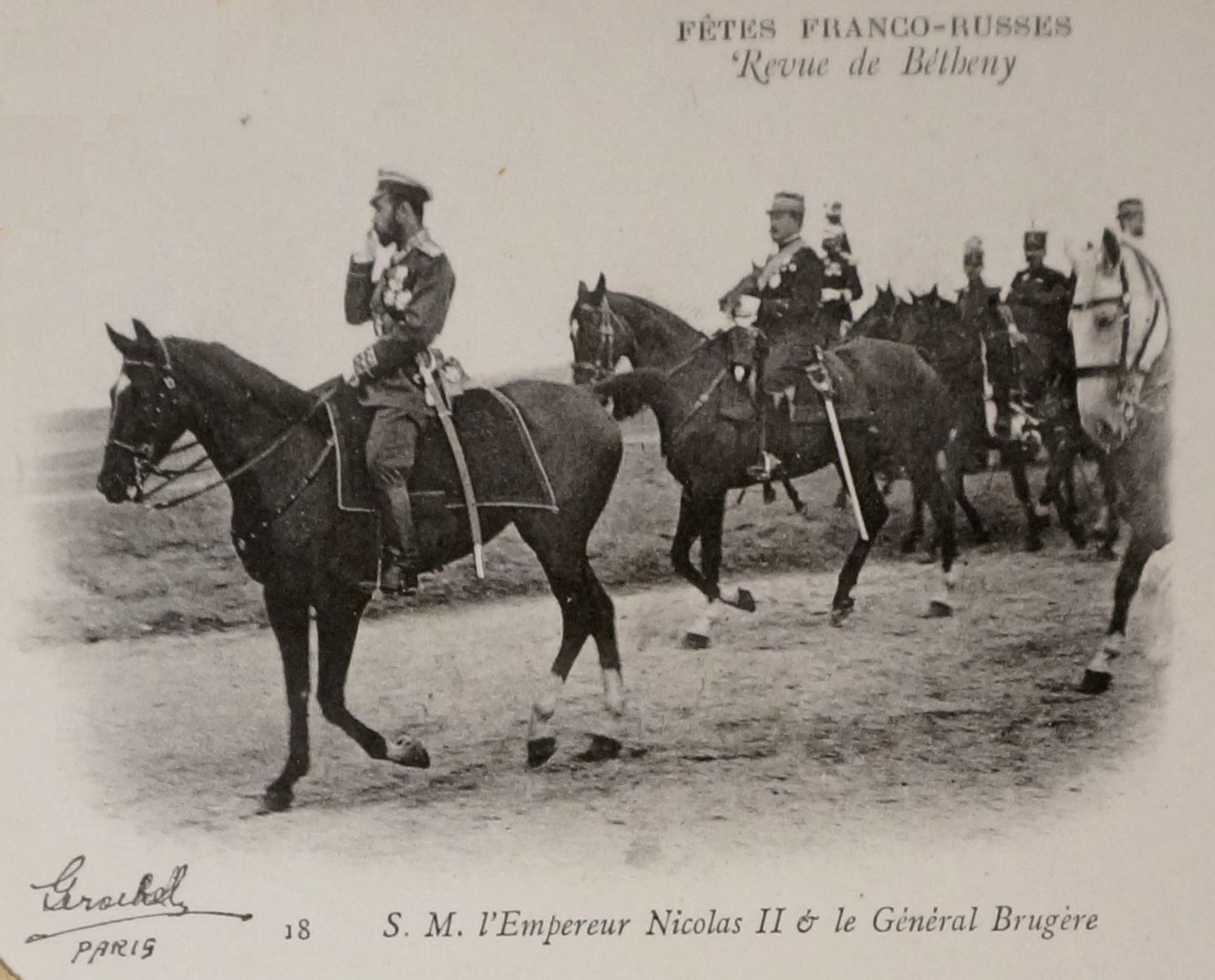 Lors des Grandes manoeuvrves de l'est de 1901, cartes posatles de 1901 de la BM de Reims sous la cote CPA t4.